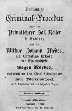 Buchtitel aus dem Verlag Strüder